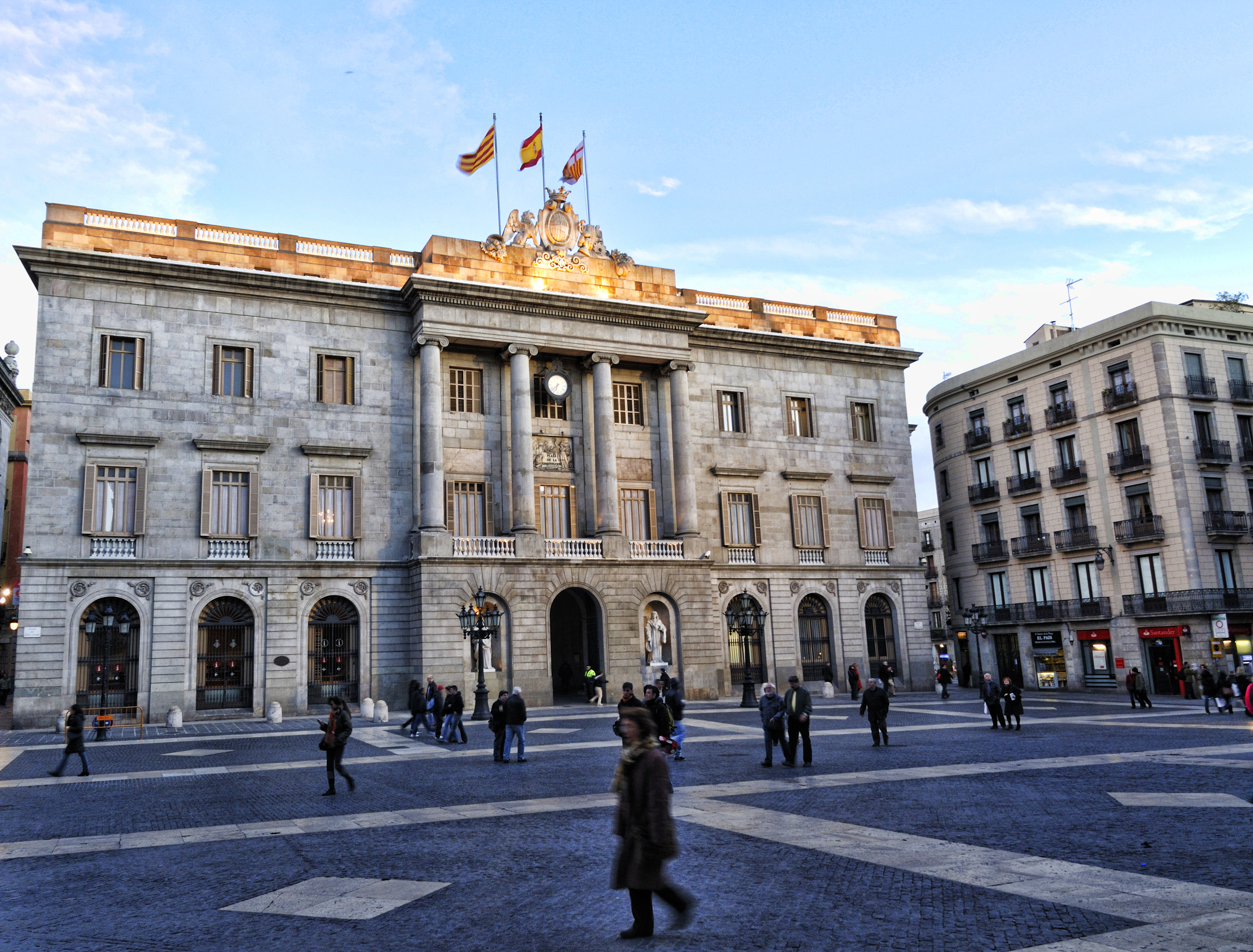 Casa de la Ciutat del Ajuntament de Barcelona.